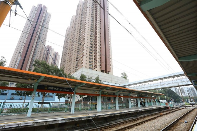 LRT Depot Stop STMC